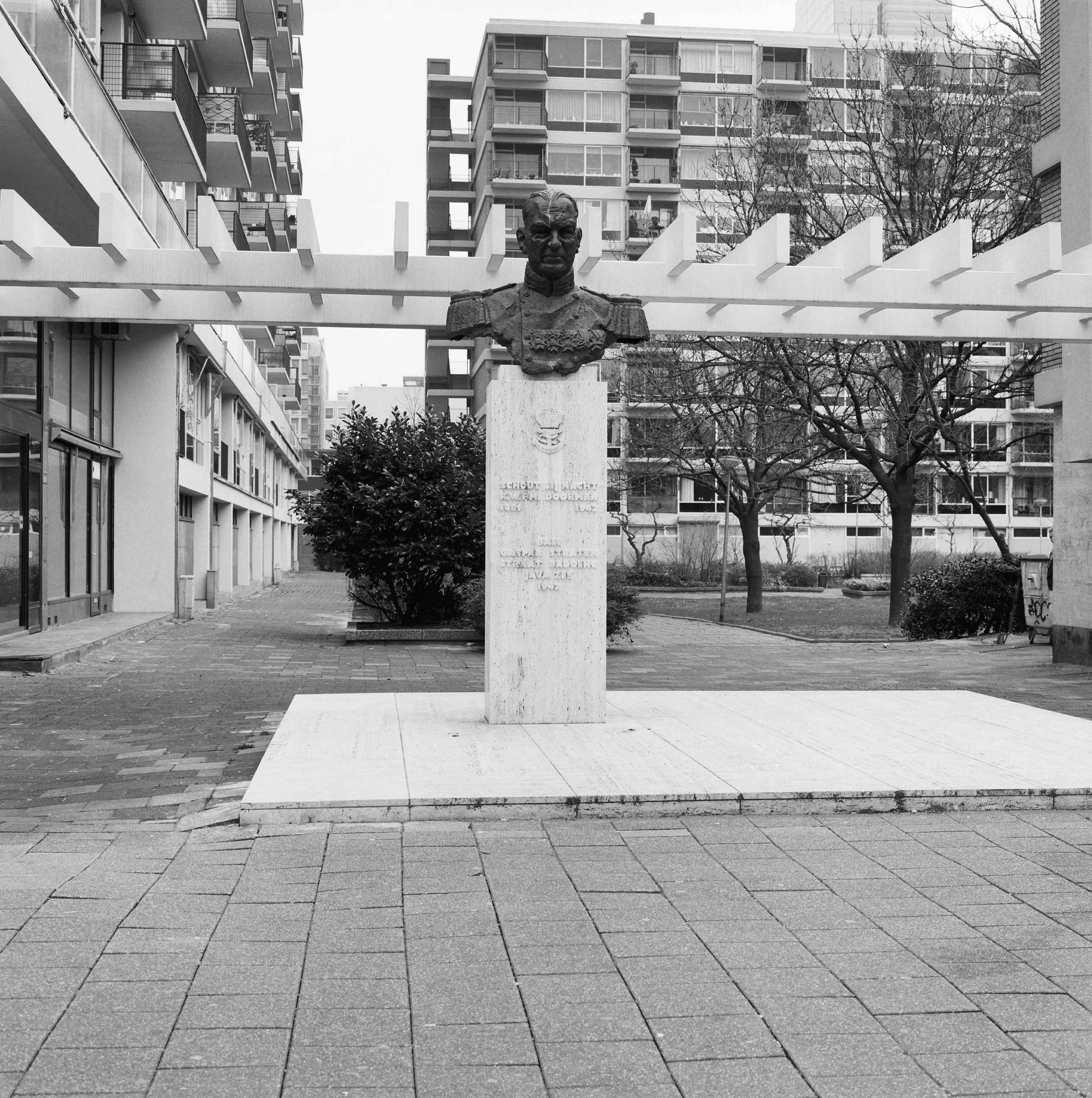 Gedenkteken: Exterieur gedenkteken van Karel Doorman, borstbeeld